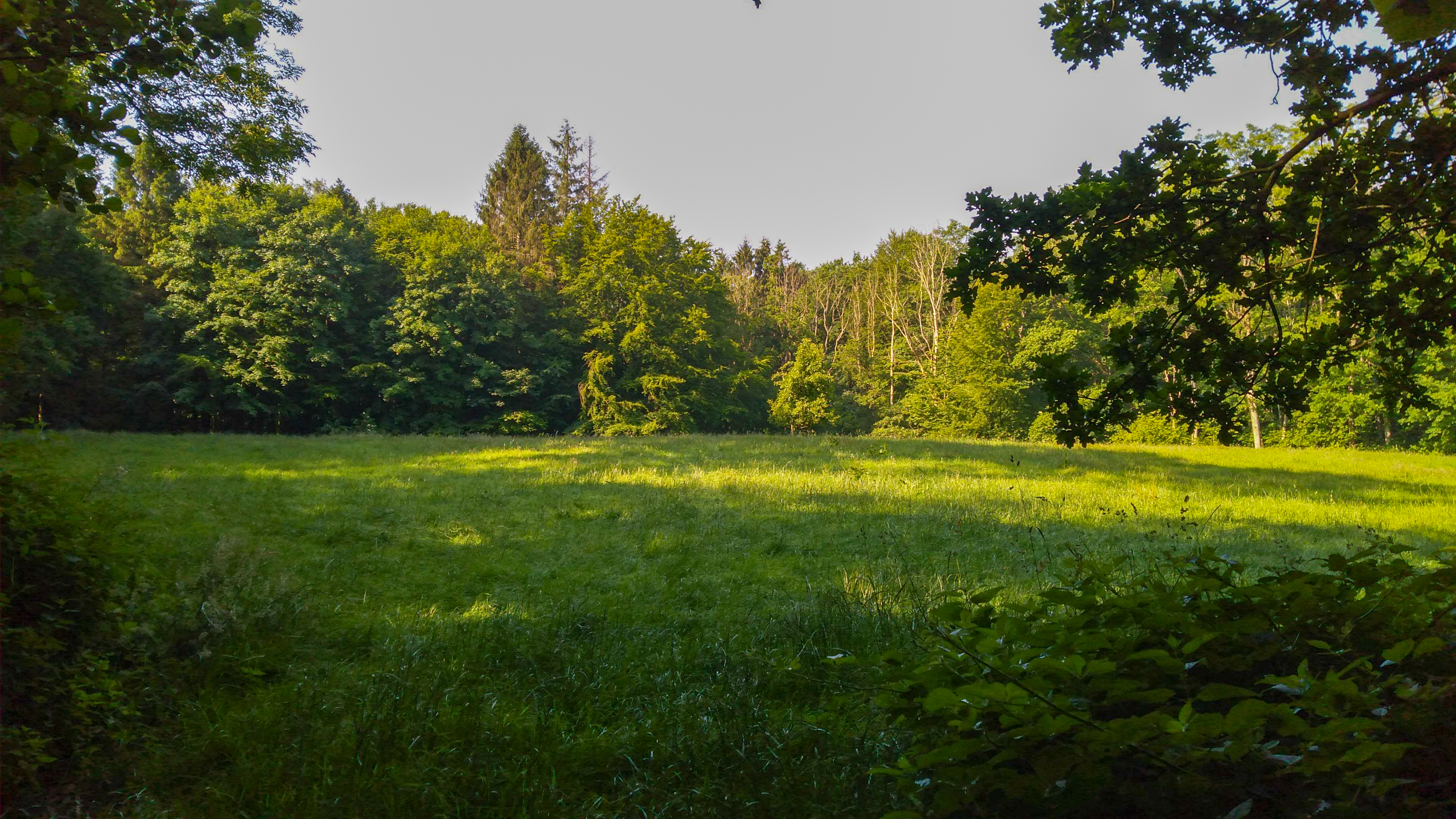 Lichtung mit extensiv genutzter Wiese im FFH-Gebiet